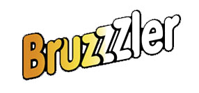 Logo der Marke "Bruzzzler" von Wiesenhof